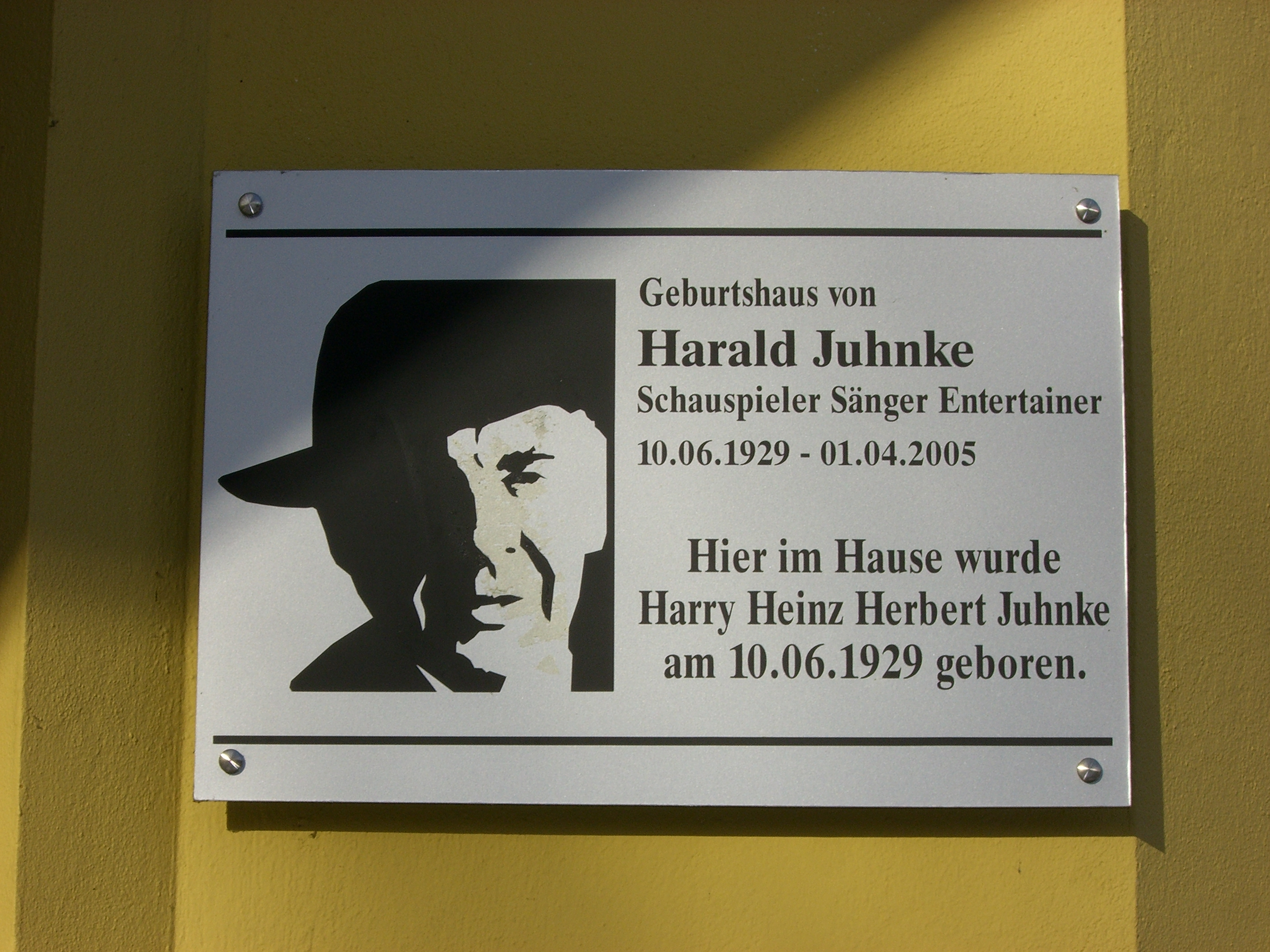 Gedenktafel am Geburtshaus von Harald Juhnke in Berlin-Gesundbrunnen, Stockholmer Straße